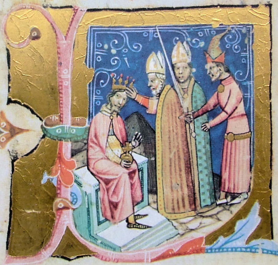 III. István koronázása. „L” iniciálé a Képes Krónikában (1358)